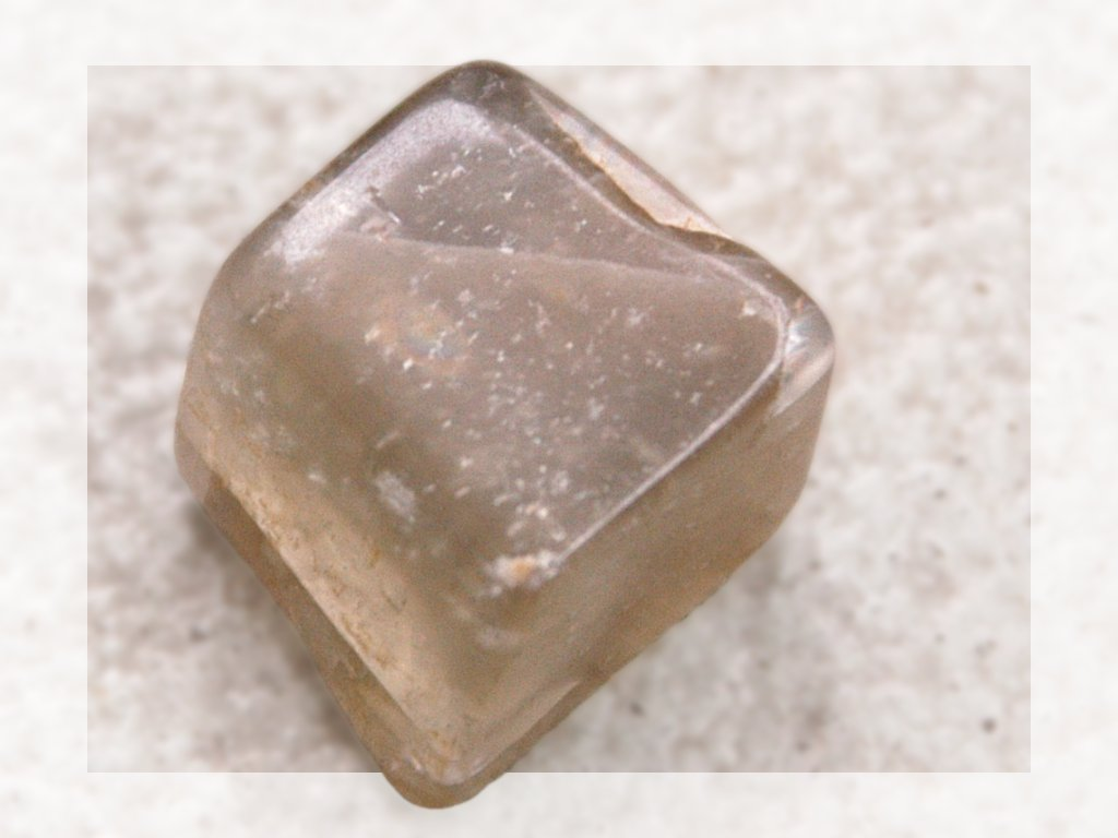 Orthoklas (moonstone / Mondstein)